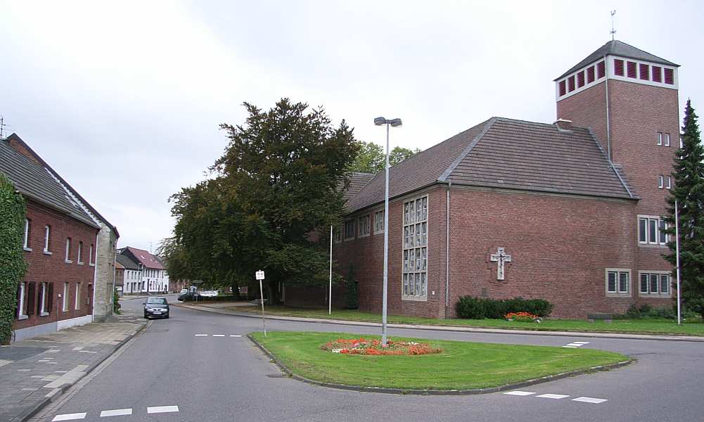 Erkelenz-Hetzerath, villagecenter and church, Germany